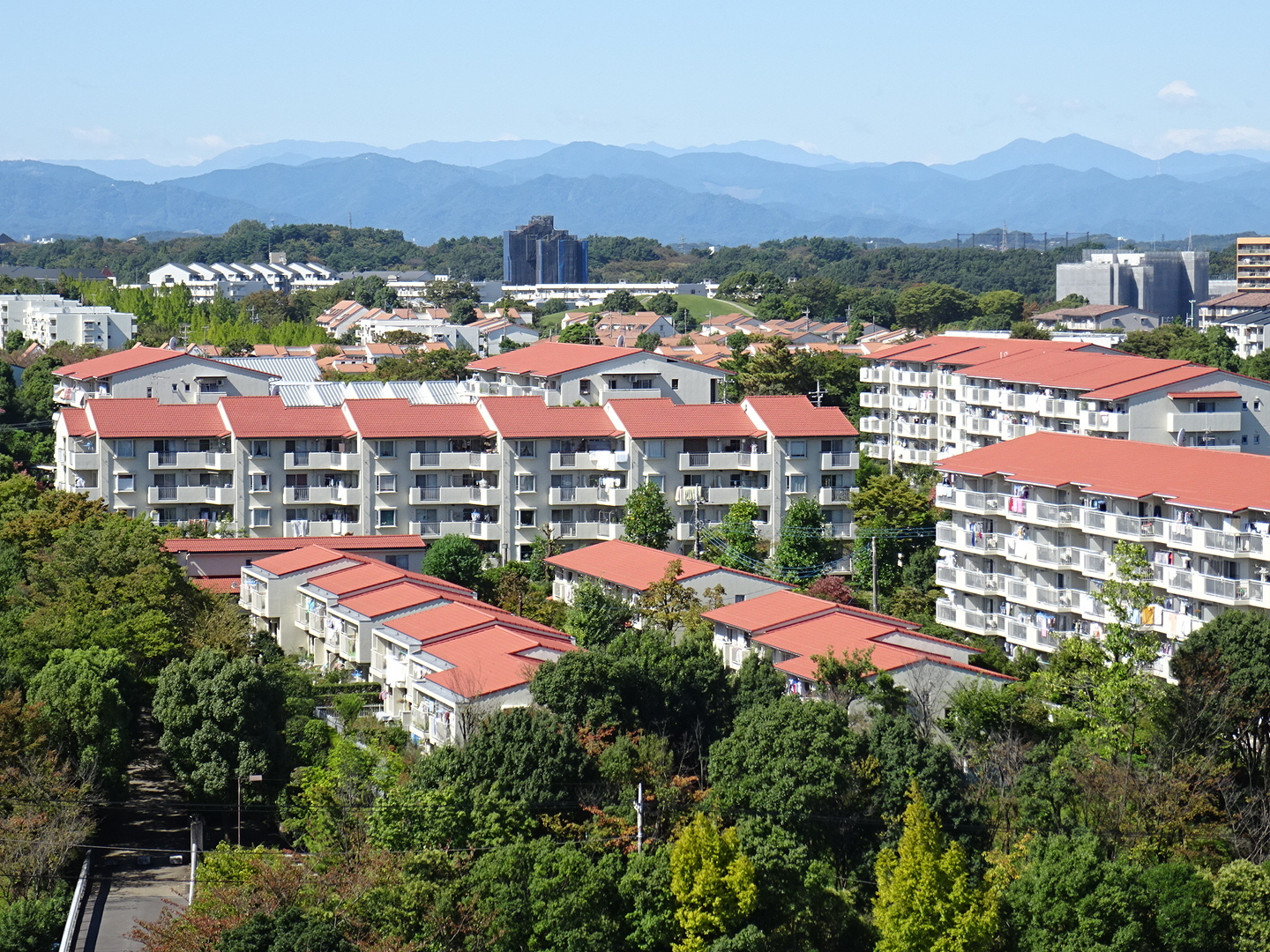 多摩市落合の多摩ニュータウンの街並み（2015/10/08撮影）